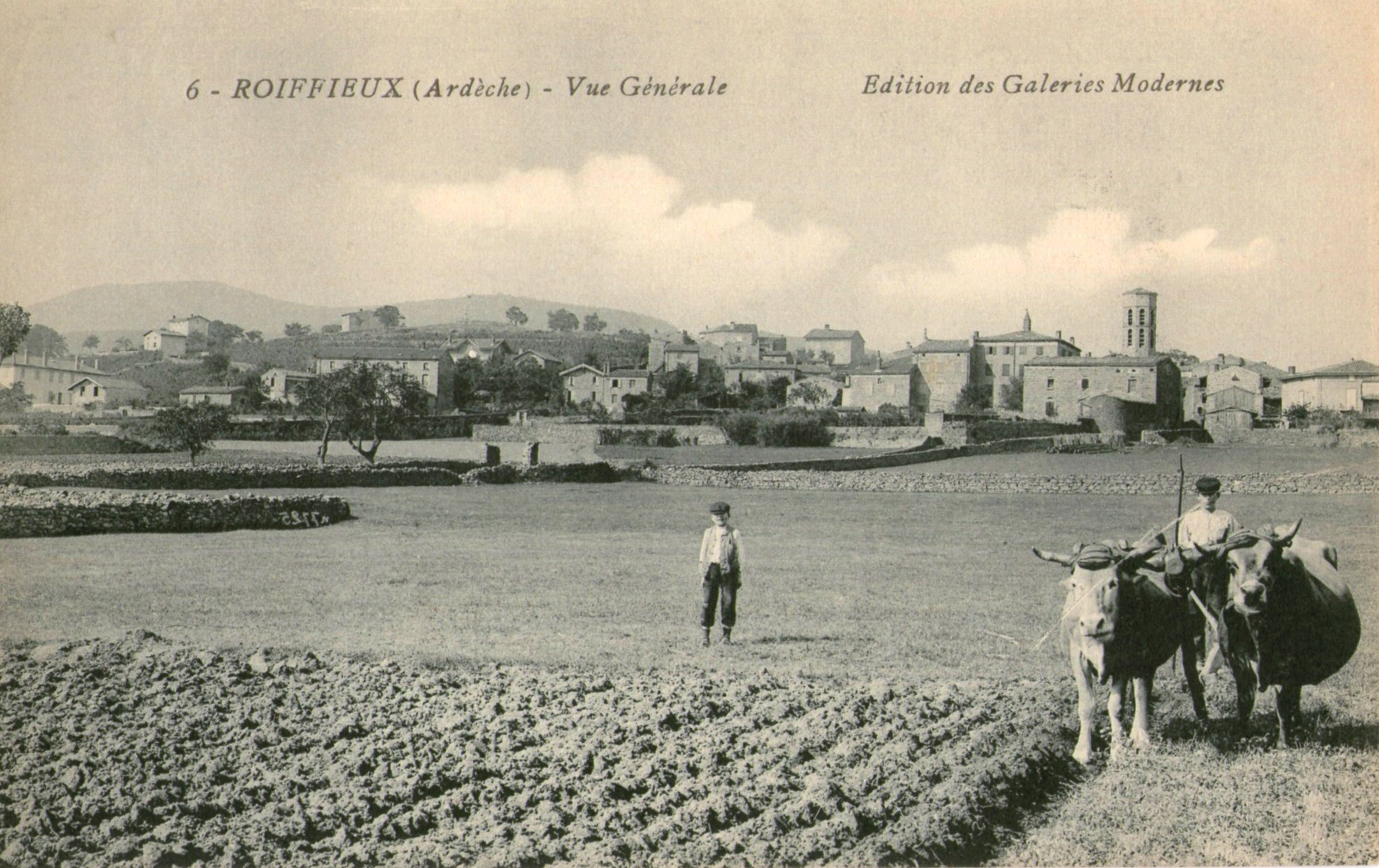 Roiffieux CP labour